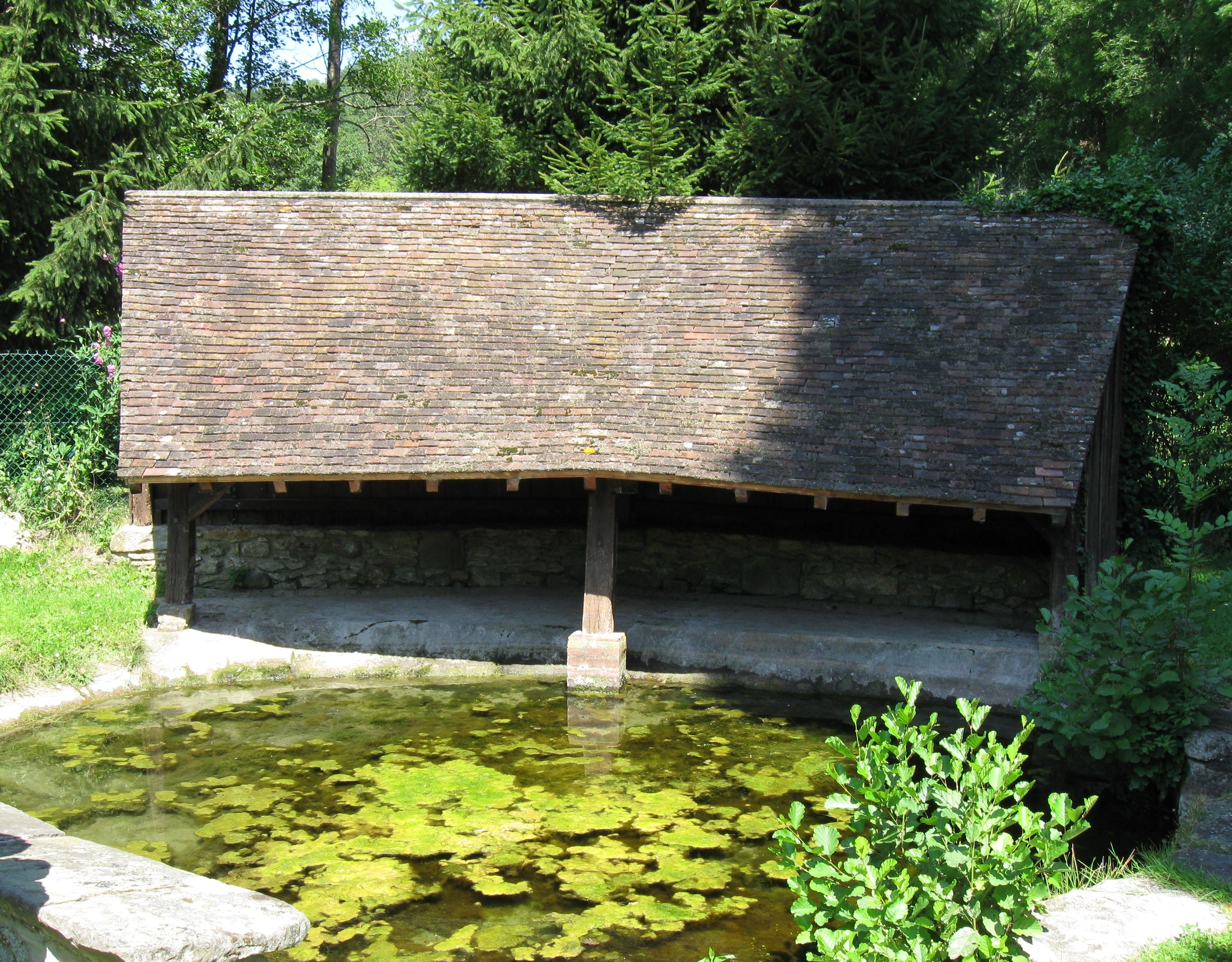 Le lavoir du Grand Droue. (Droue-sur-Drouette, département d'Eure-et-Loir, région Centre).